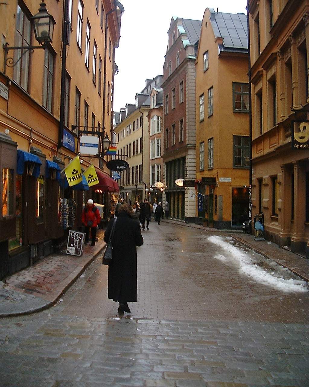 Västerlånggatan, Gamla stan, Stockholm